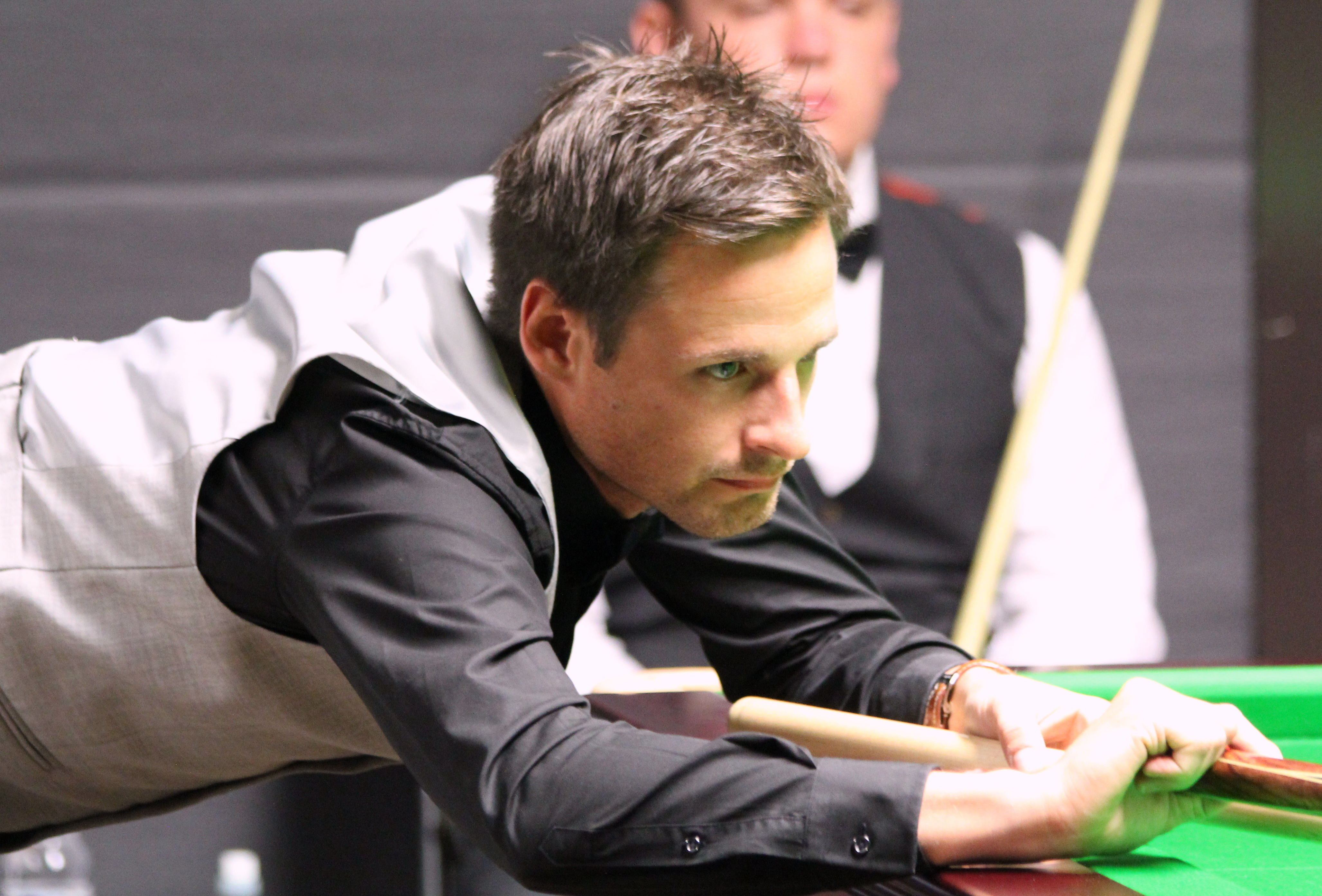 David Gilbert beim Paul Hunter Classic 2016